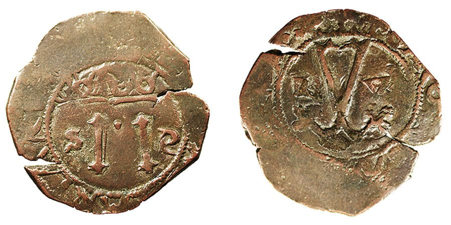 Moneda de quatre morabatins encunyada a Santo Domingo, regnant Carles I d'Espanya i la seva mare Joana I de Castella. Feta en coure, no presenta data d'emissió.